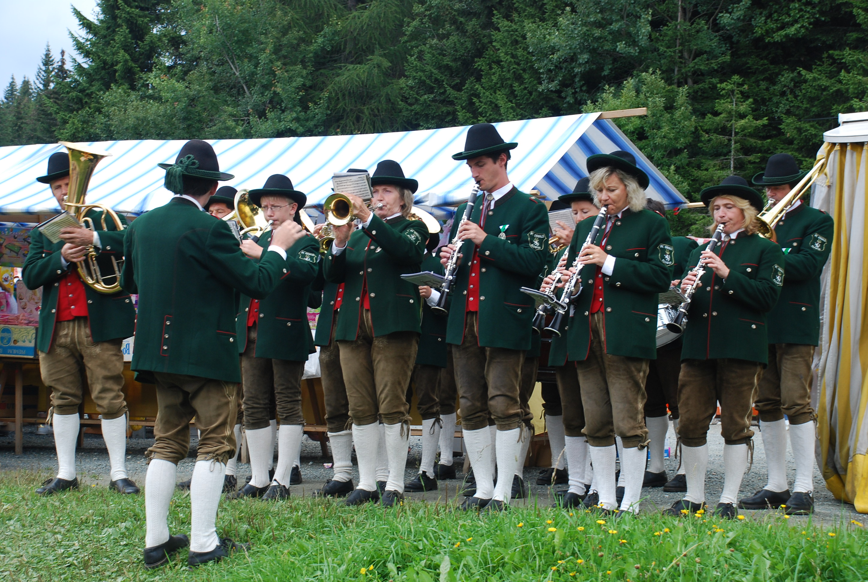 Musikkapelle der Gemeinde Kloster am Hebalmkirtag 19. August 2007